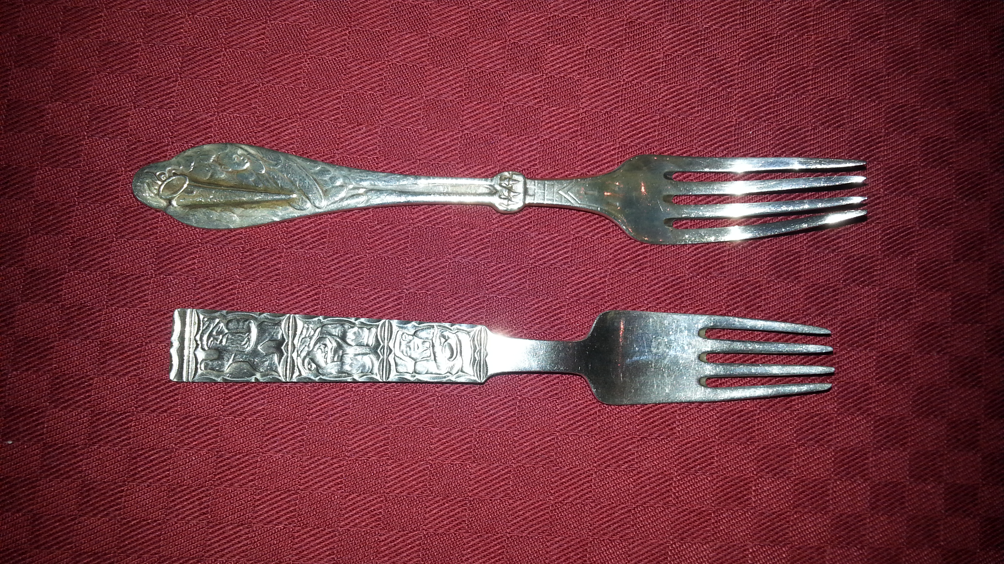 Barnegafler av sølv. Den nederste har tre troll på skaftet og er laget av J. Tostruo AS i Oslo omkring 1945, lengde 24 cm. Den øverste med stork på skaftet er datert 1971, lengde 25,5 cm.